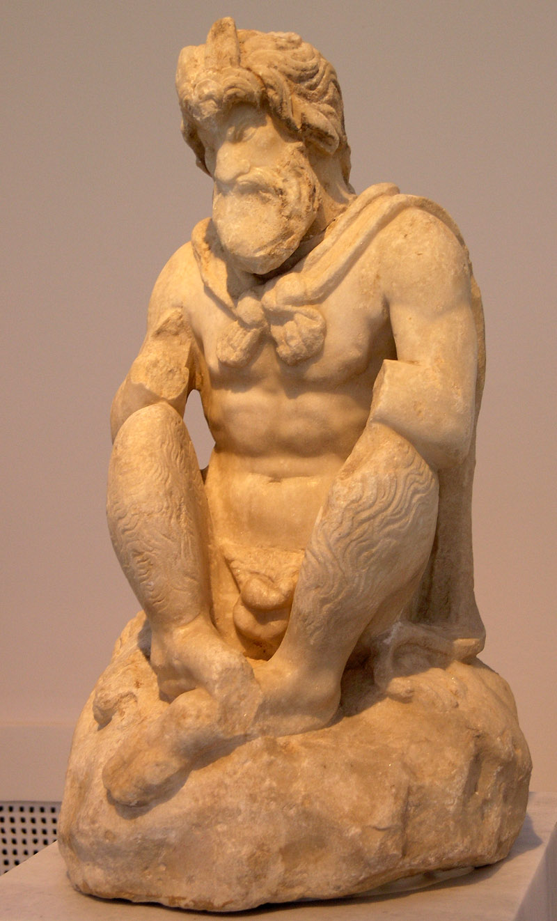 Statuette de Pan en marbre pentélique, trouvée à l'Olympiéion à Athènes. Le dieu à pattes de chèvre est assis en tailleur sur un rocher couvert d'une peau d'animal. Il devait tenir la flûte de pan dans ses mains. Œuvre du IIe s. a. C., copie d'un original du IVe s. probablement. Musée archéologique national, Athènes.